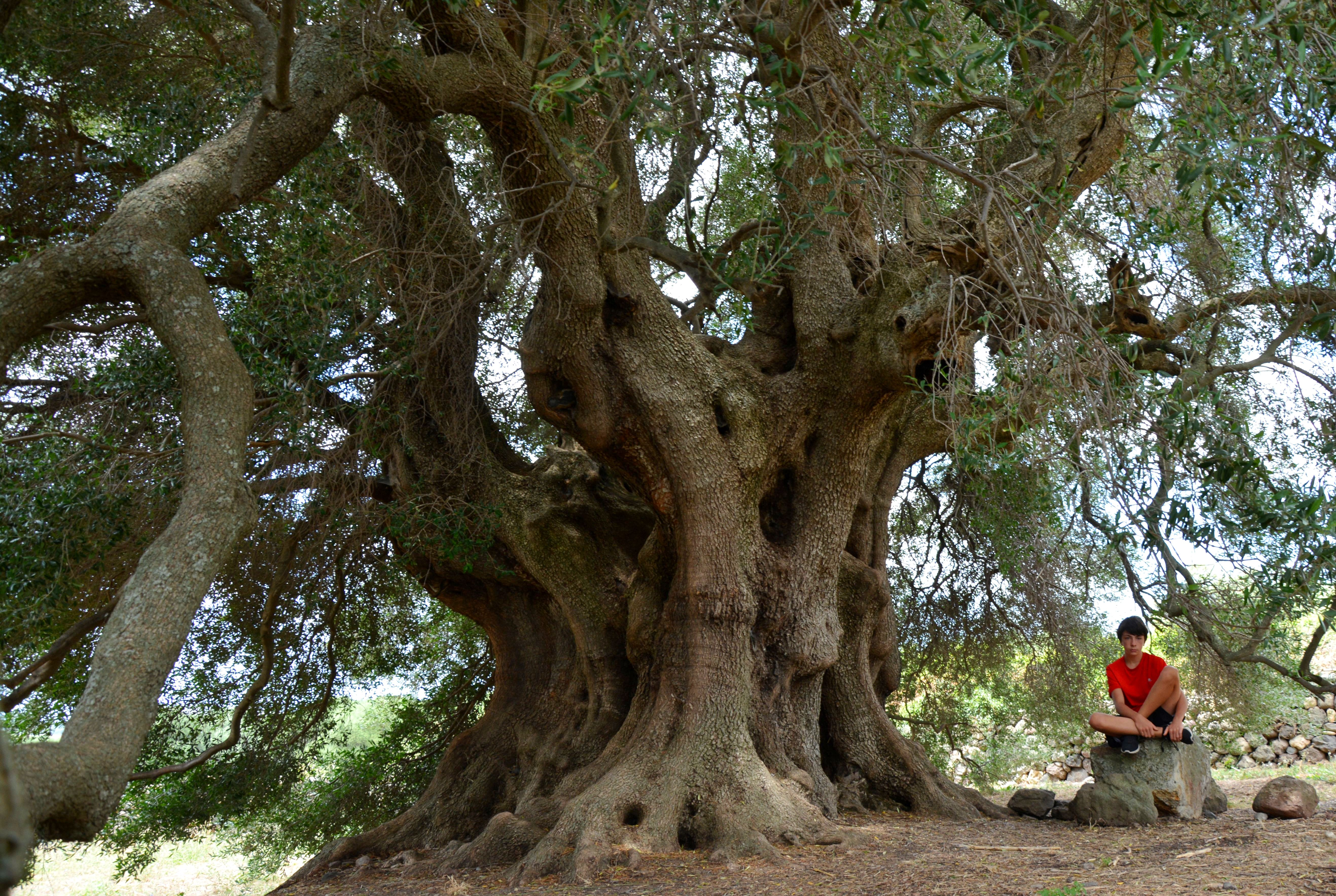 Mille anni, forse di più - L'olivo selvatico nei pressi di Cuglieri This is a photo of a monument which is part of cultural heritage of Italy.